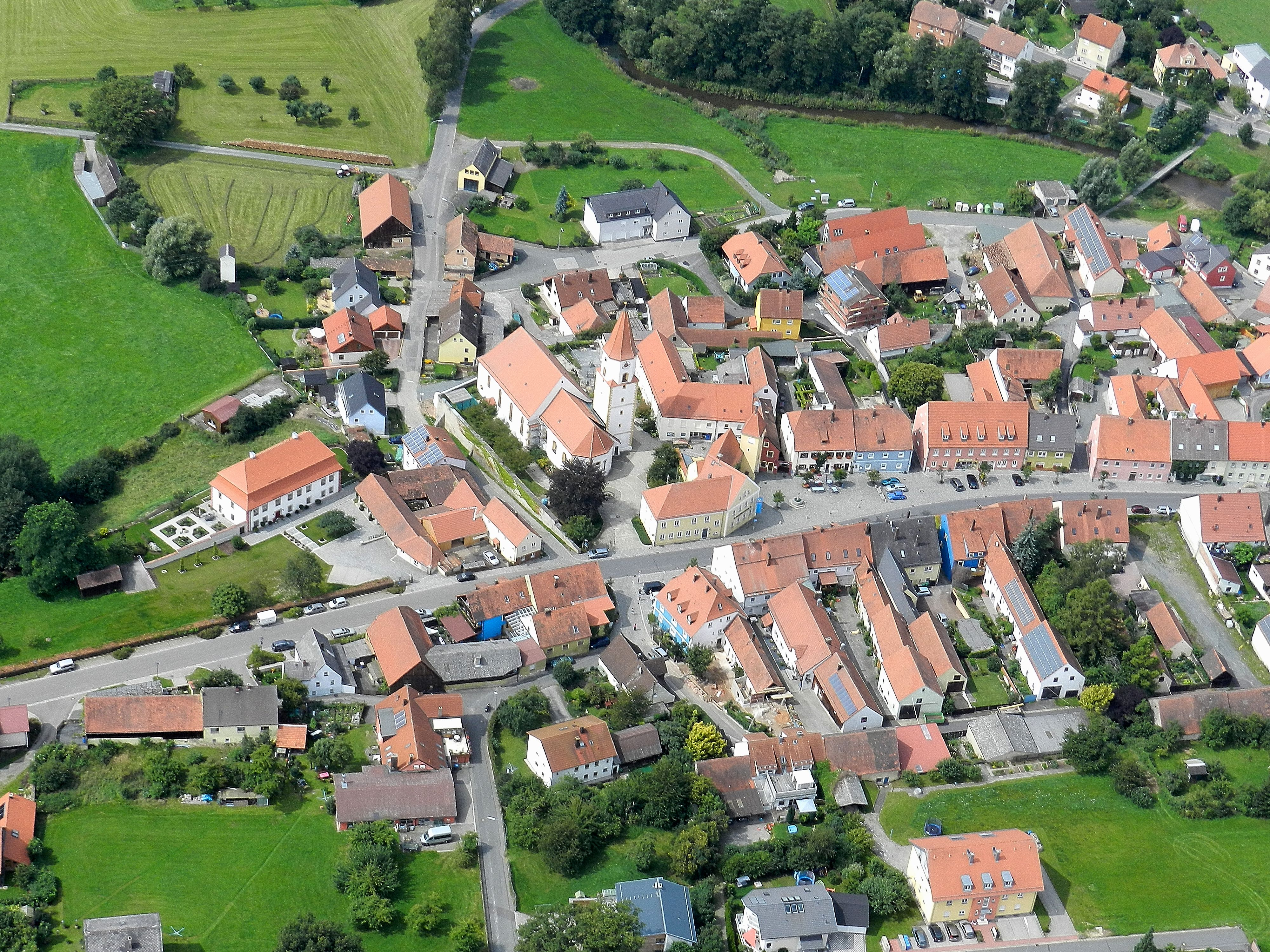 Markt Luhe, Landkreis Neustadt an der Waldnaab, Oberpfalz, Bayern (14. August 2011). Der gewachsene historische Marktplatz in Luhe weitet sich in südlicher Richtung trichterförmig auf. Links im Bild die Pfarrkirche St. Martin.